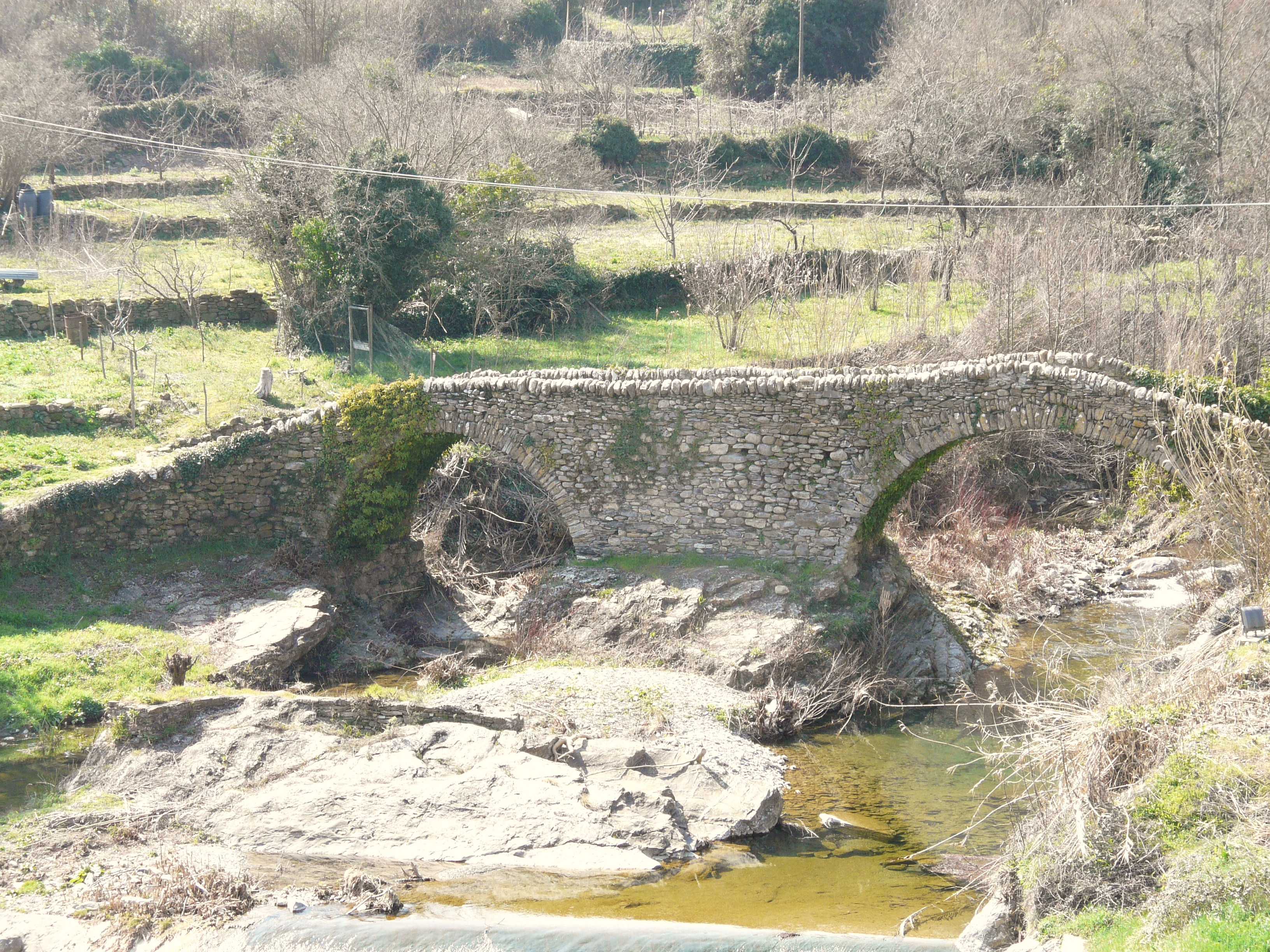 Ponte, Prelà, Liguria, Italia